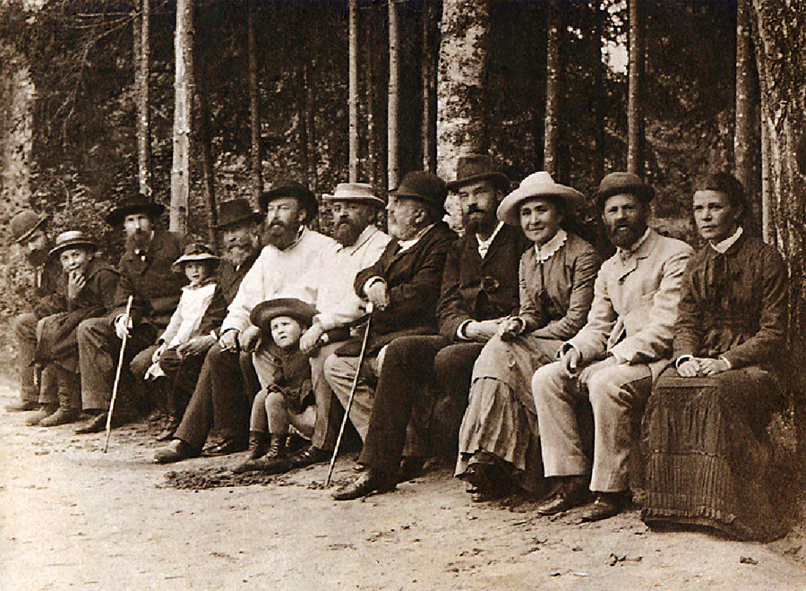 Савва Мамонтов и группа участников Абрамцевского кружка. 1880-е